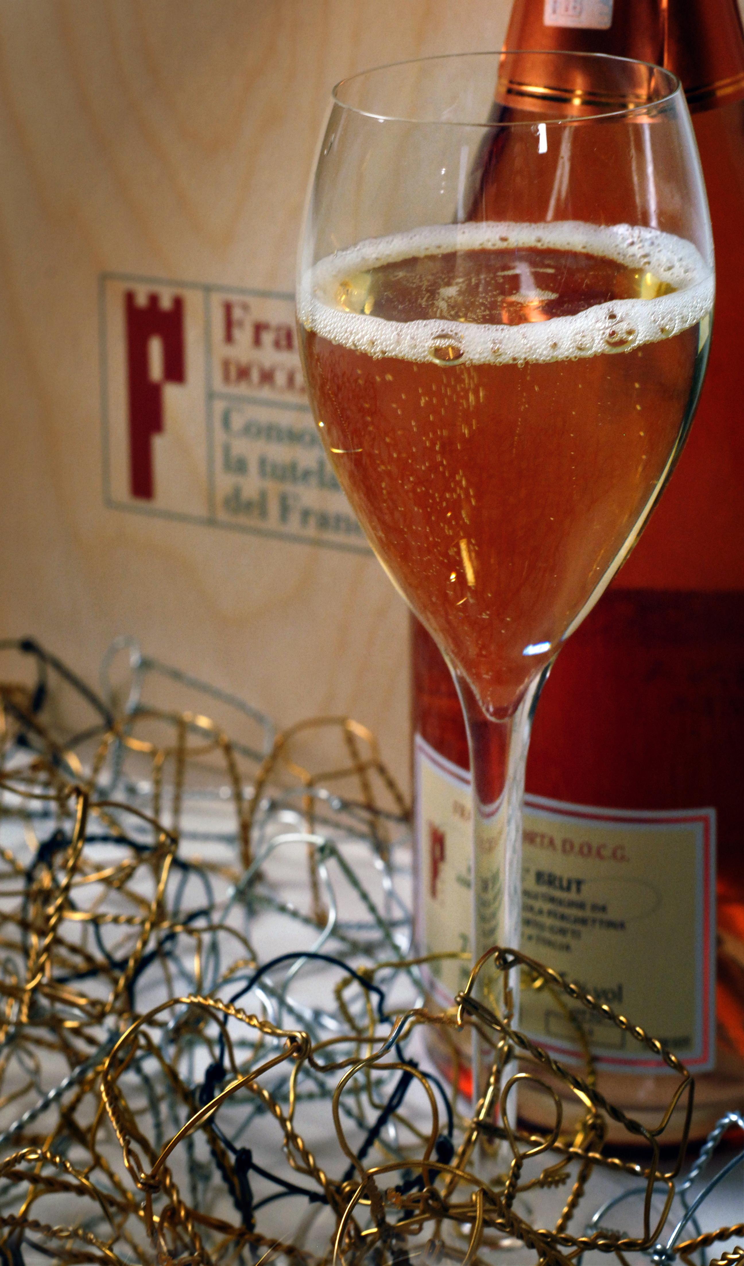 Un calice di Franciacorta Rosé